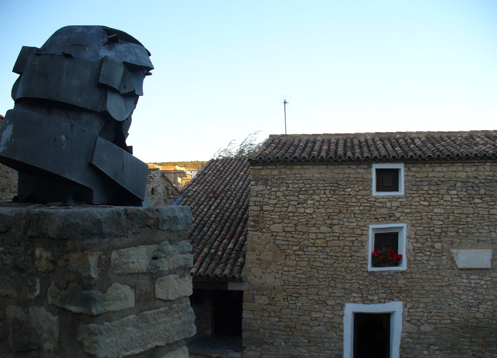 Aragonés: Estatua de Franzisco de Goya debán d'a suya casa natal en Fuendetoz, Zaragoza